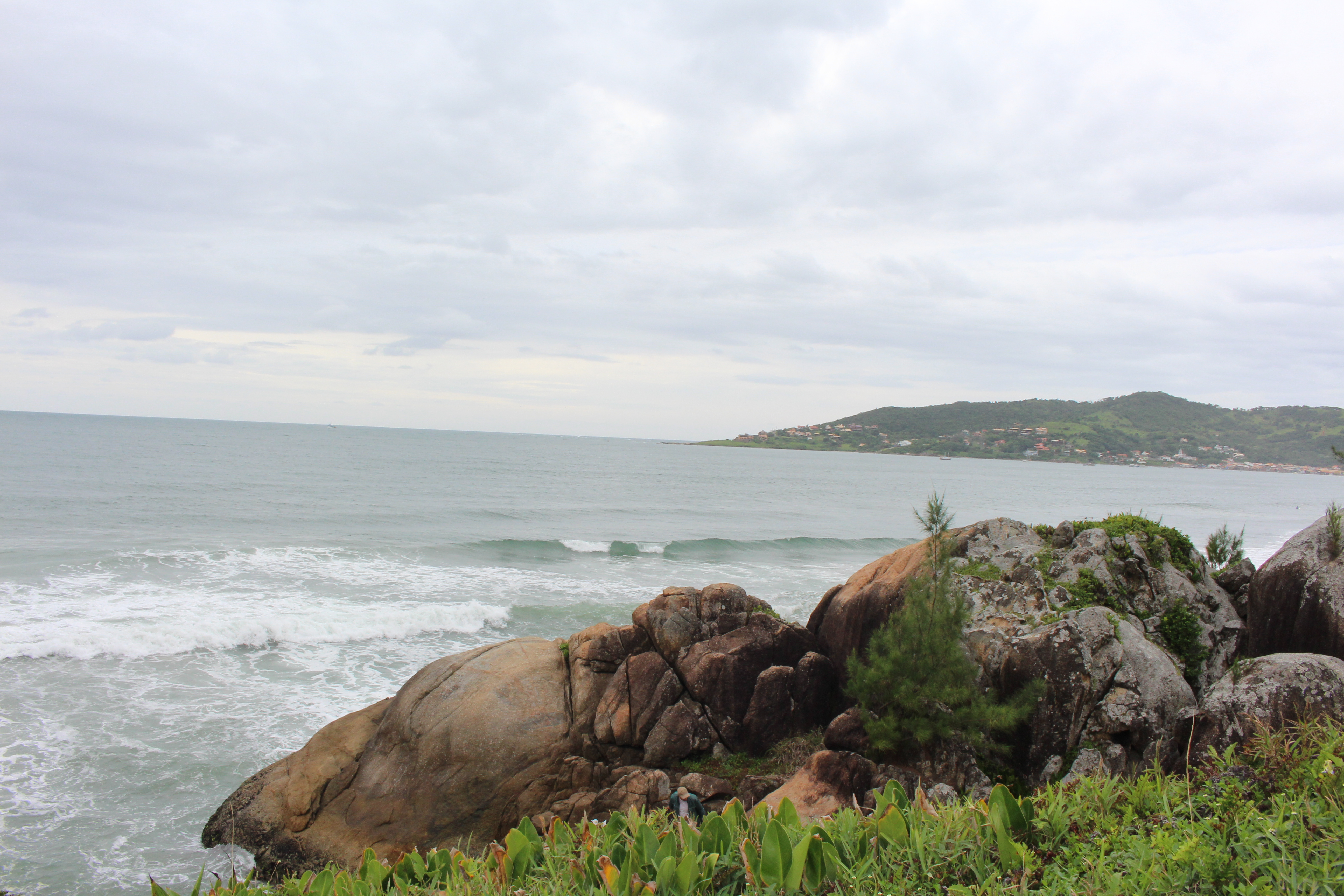 nnnnn